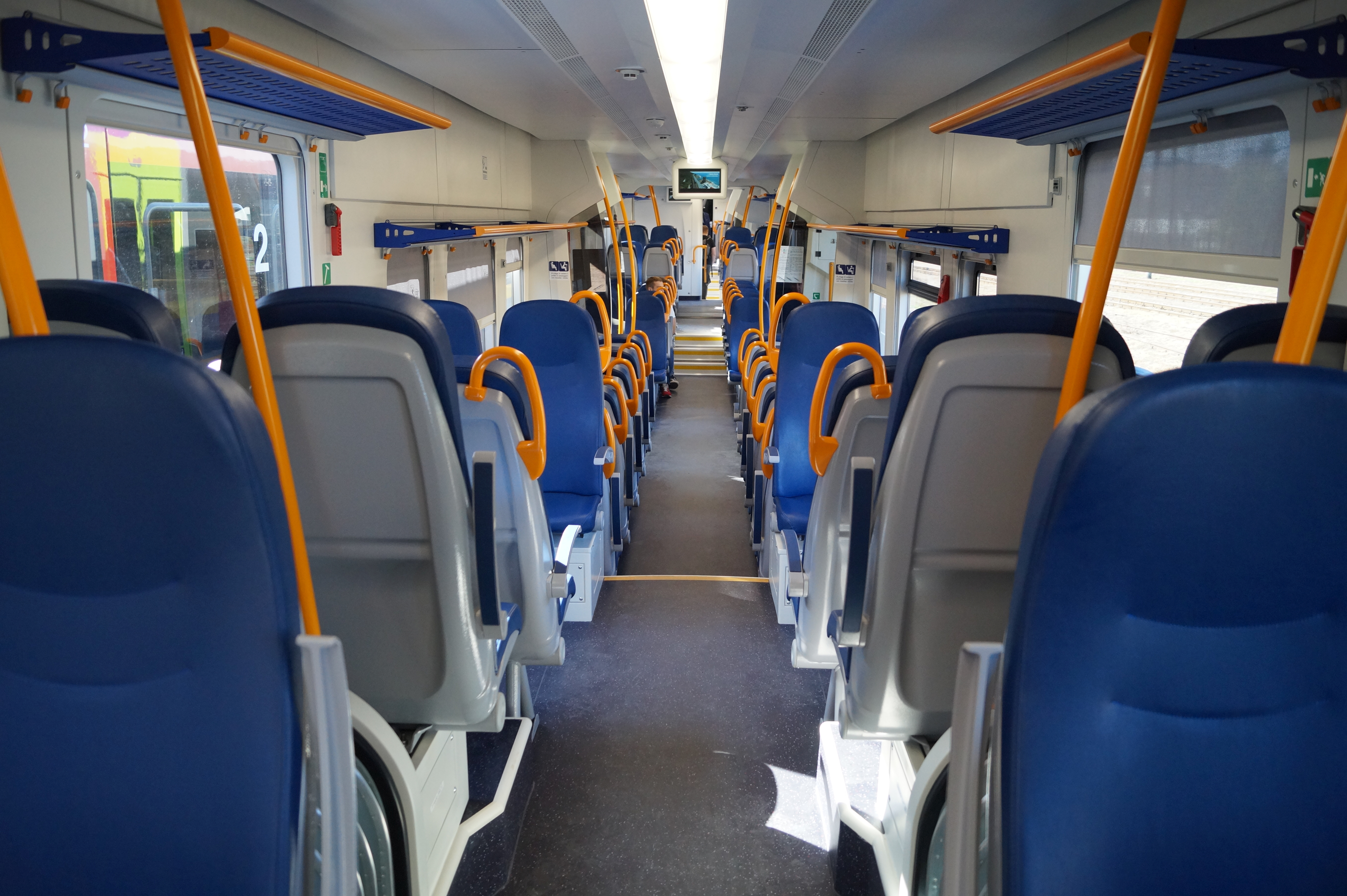 The making of this document was supported by Wikimedia Polska Association, within Wikigrant no. WG 2015-34. English | polski | +/− Przedział pasażerski w SZT ATR220Tr (Pesa Atribo) w barwach FER wystawianym na Targach Trako 2015